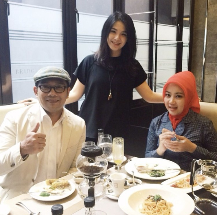 Devina Hermawan memasak untuk Ridwan Kamil dan Atalia Prataya